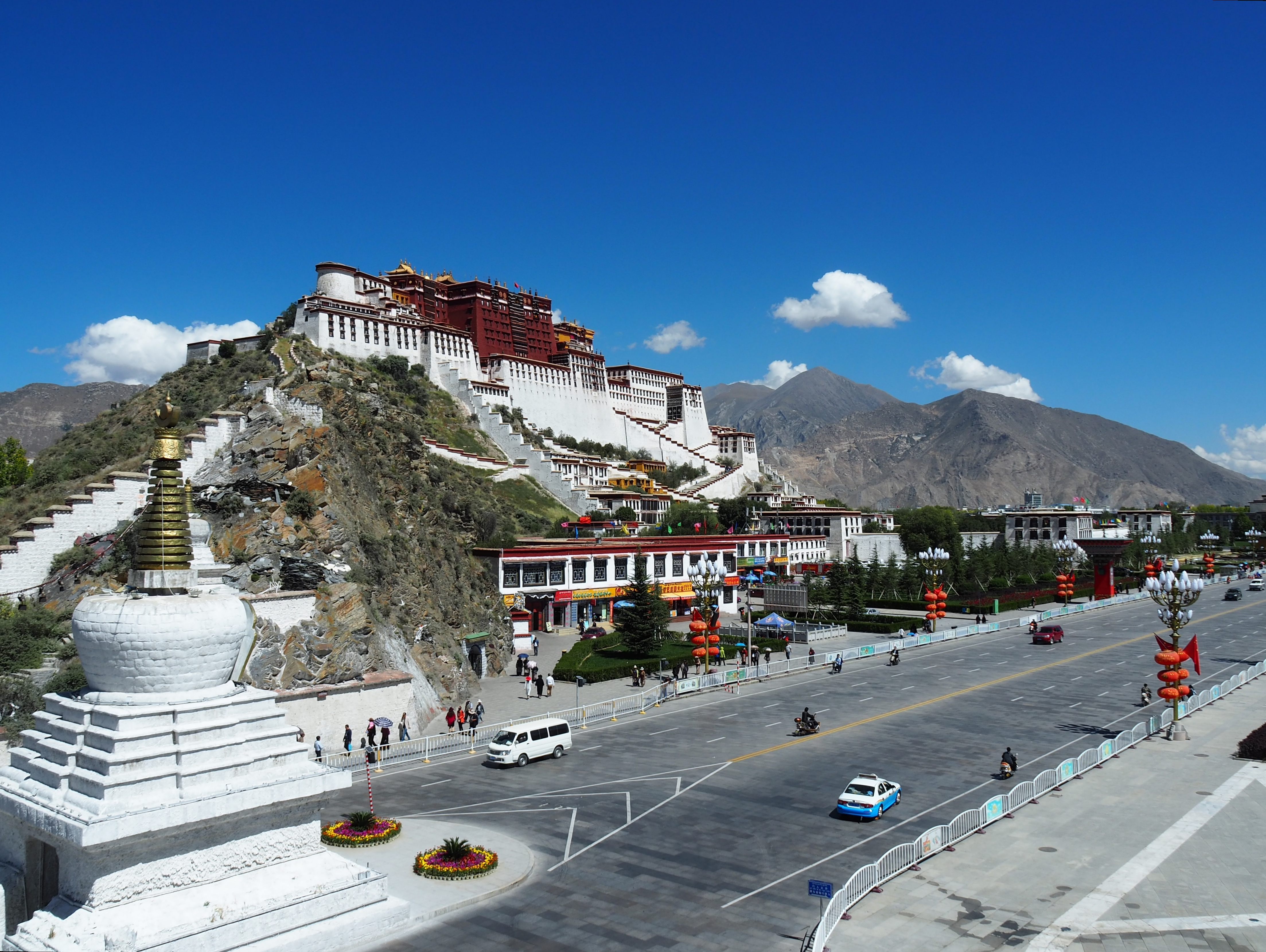 Potala Palace